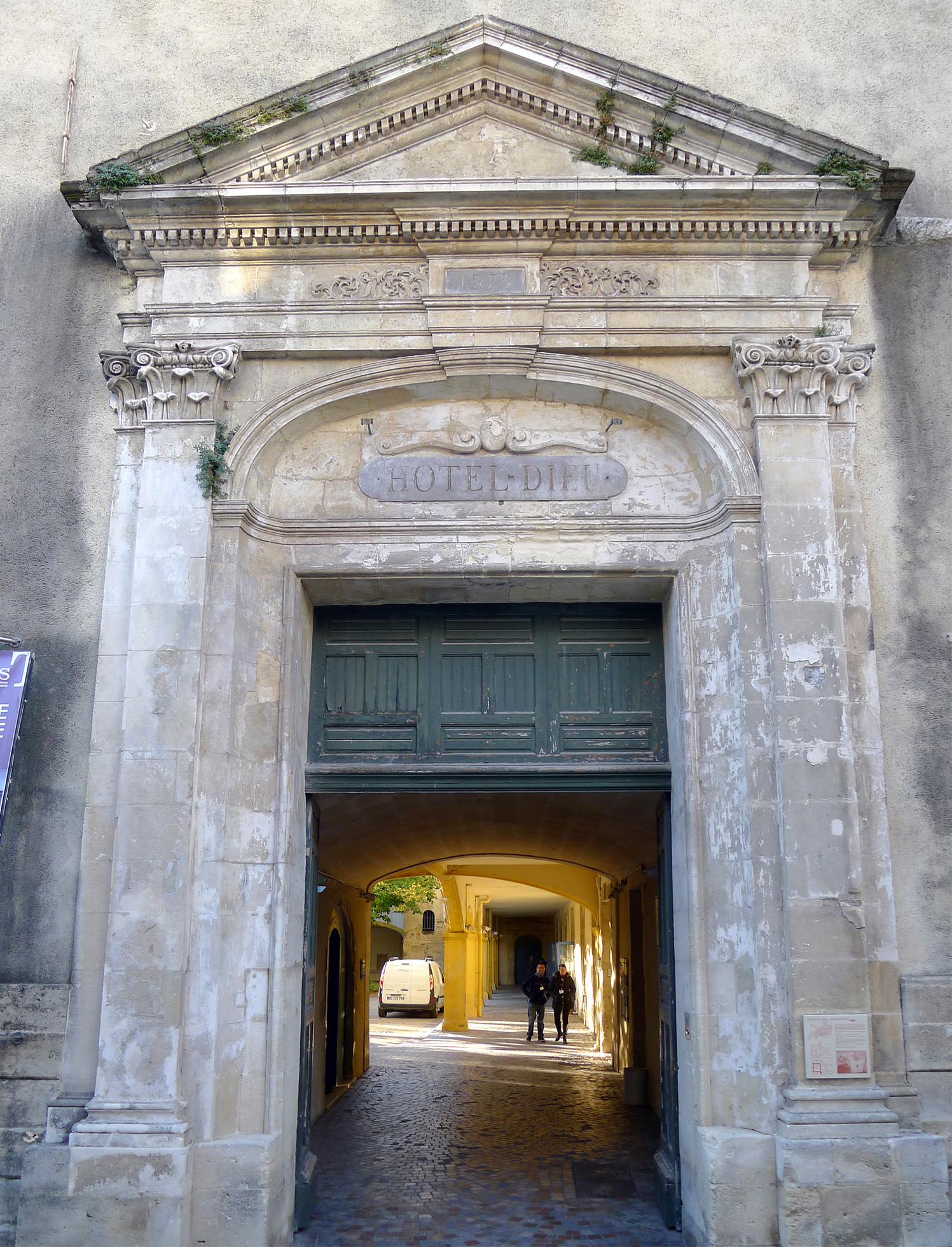 Ancien hôtel-Dieu (entrée) - Arles, France